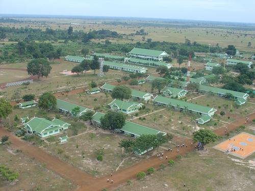 ភាសាខ្មែរ: រូបភាពមើលពីអាកាស